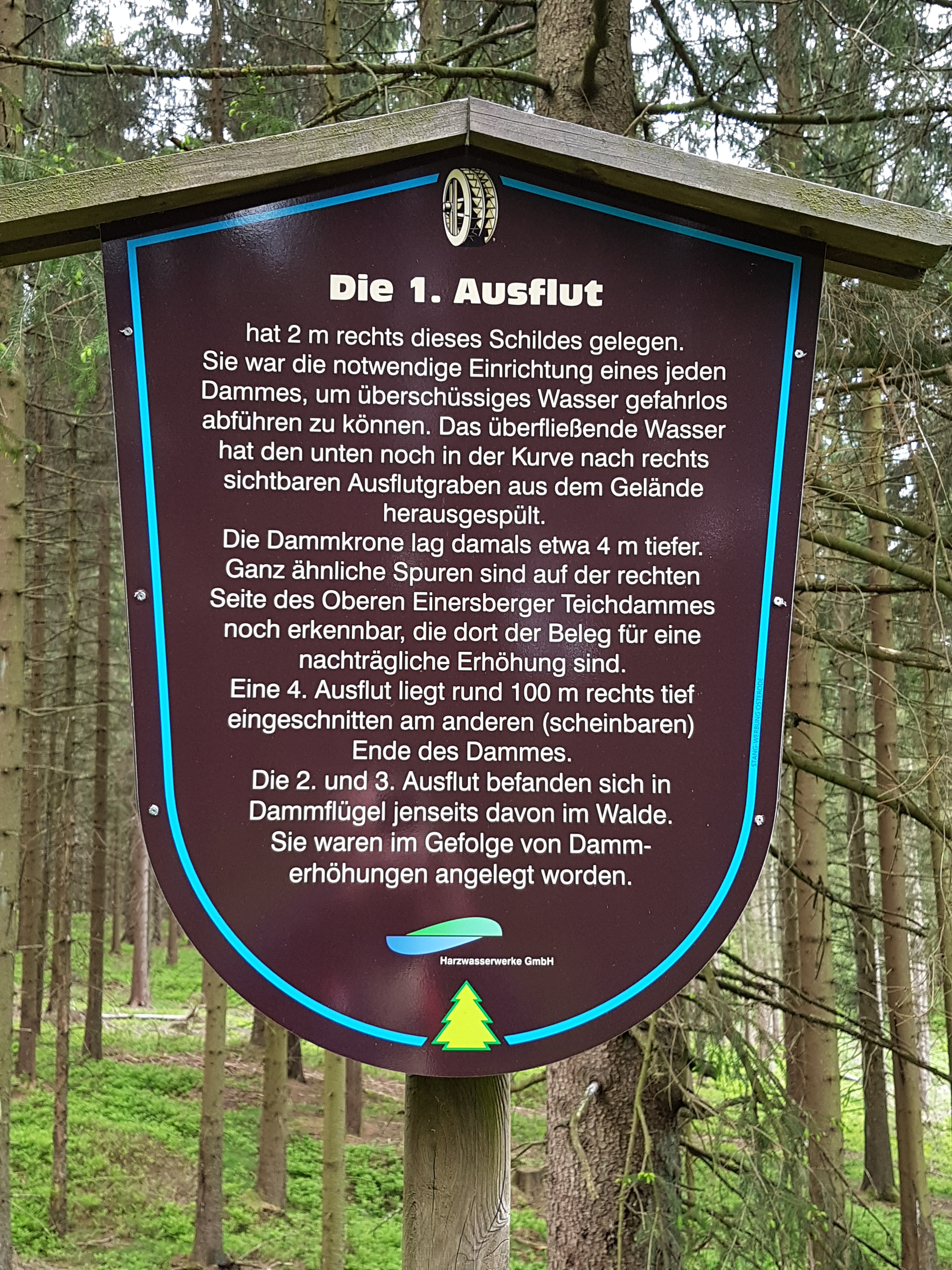 17.1-Infotafel Ausflut, 26-05-2019